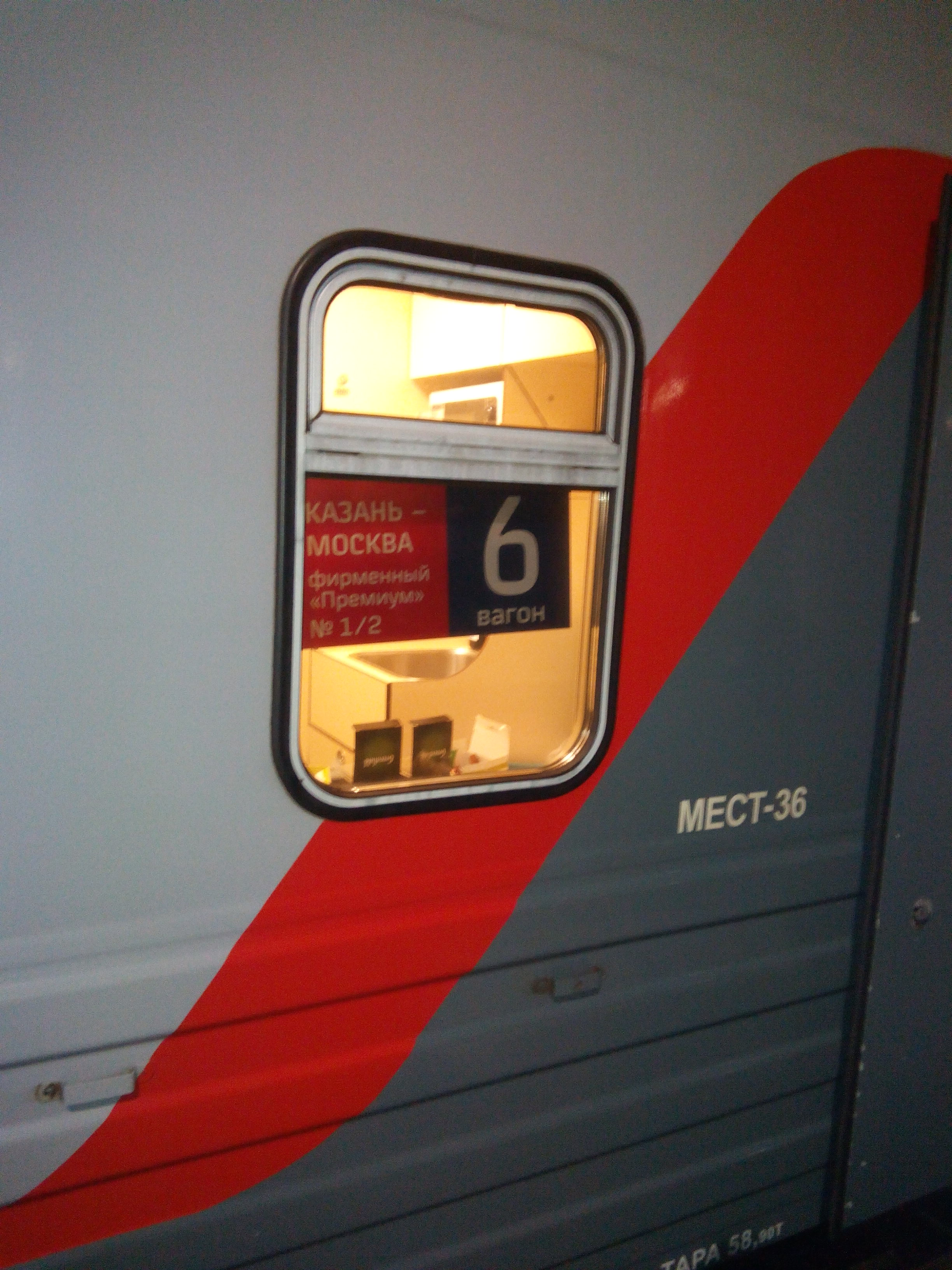 Premium train car